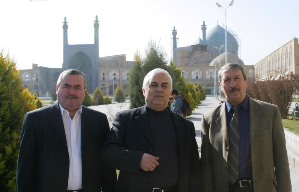 Делегация Таджикистана в составе Ш.Комилзода, А. Хамдам, М.Бахти в Иране, 2006 год